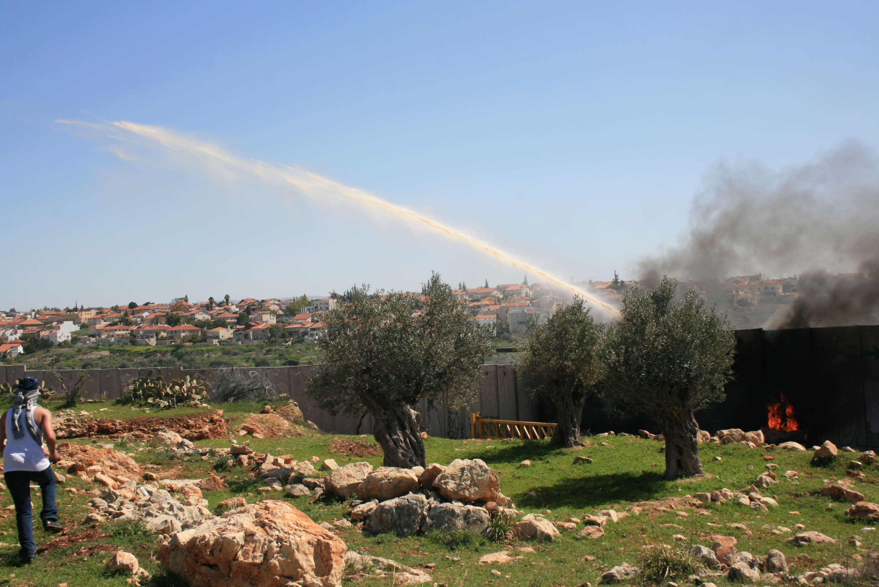 סילון "בואש" מותז לעבר מפגינים בניעלין, 9 במרץ 2012 Unknown